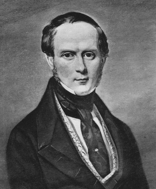 Thomas Aspelin